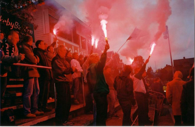 Banden mot Raufoss i 2001.